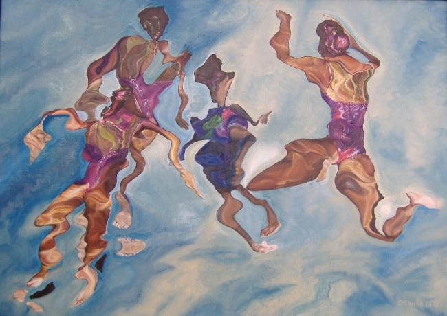 Gyebnár István: Átalakulás; olaj festmény; 50x70 cm